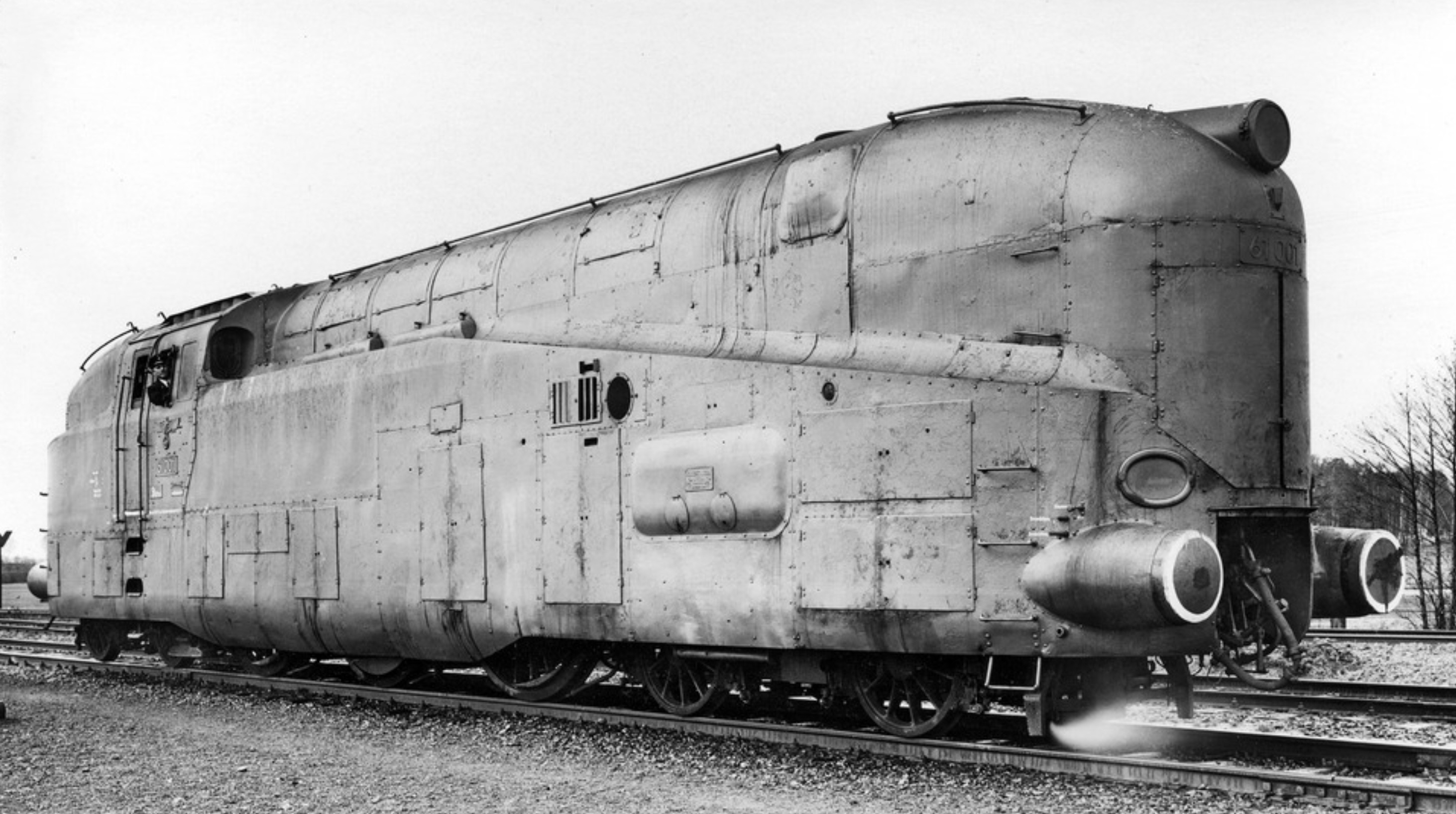 Tenderlokomotive 61 001 der DR-Baureihe 61 im grauen Kriegsanstrich